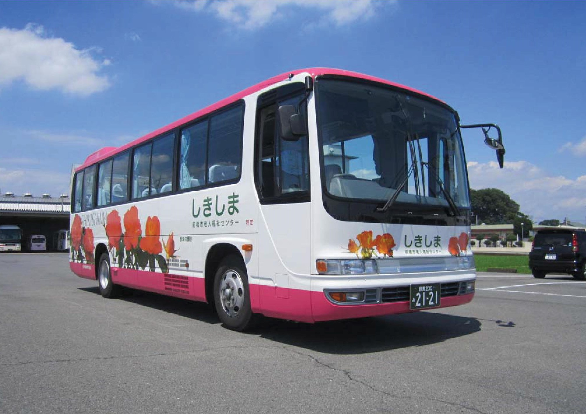 永井バスの特定バス いすゞガーラ・ミオ